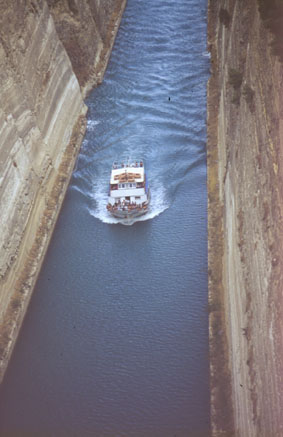 Kanal von Korinth / Griechenland